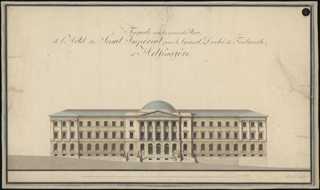 Valtioneuvoston linna: leikkauspiirustus; julkisivu Senaatintorille